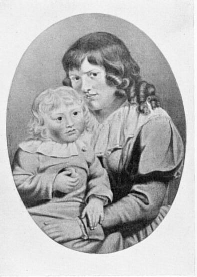 Christiane Vulpius und August. Aquarell von Johann Heinrich Meyer, 1793. August Goethe (1789-1830) blieb das einzige überlebende Kind der Christiane. Seine unregelmäßige Schulbildung ordnete Goethe an, der ihn erst mit vierzehn Jahren durch den Hausgenossen Riemer systematisch unterrichten ließ. 1808 bezog August die Universität Heidelberg, später Jena; 1810 vermittelte ihm der Vater die Stelle eines Kammerassessors, zog ihn jedoch wesentlich bei seiner Oberaufsicht über die Anstalten für Wissenschaften und Kunst zu Hilfeleistungen praktischer Art heran. Ein Jahr nach dem Tode verheiratete sich August unglücklich mit Ottilie von Pogwitsch.